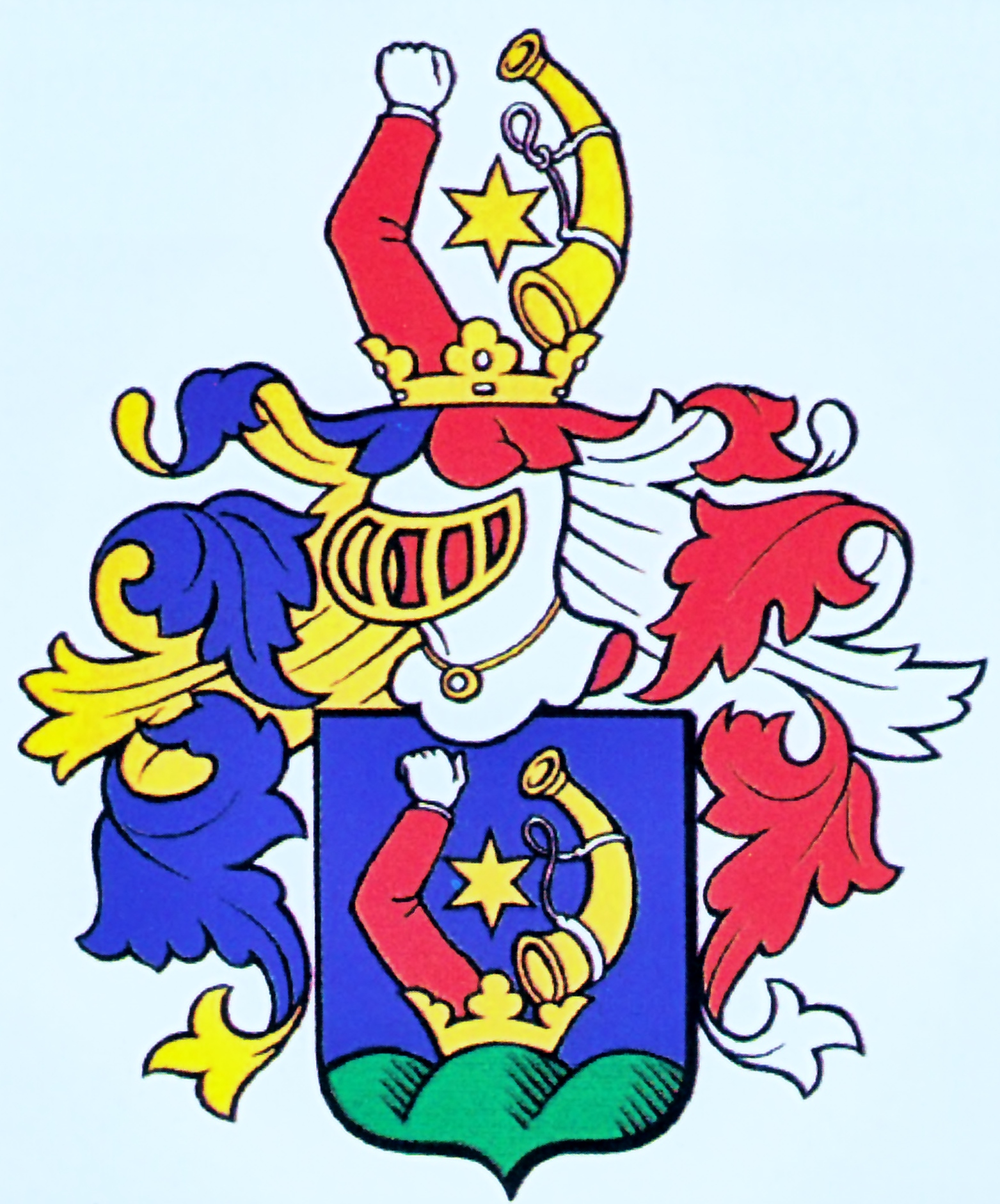 Erb rodiny Szentivanyovcov, zakladateľov Štrbského Plesa, majiteľov rozsiahlych pozemkov v Liptove